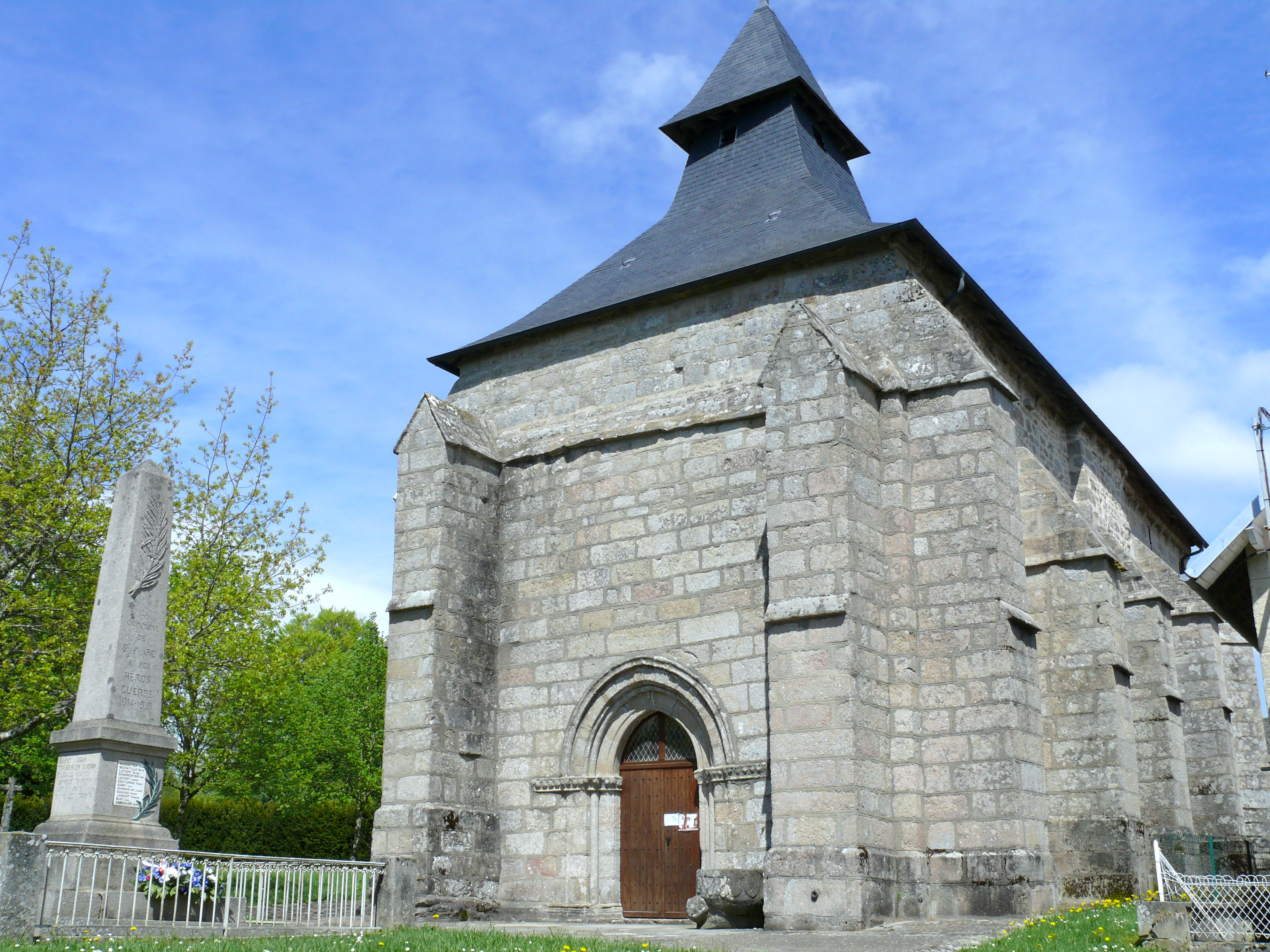 Saint-Marc-à-Loubaud - Eglise Saint-Marc-Sainte-Agathe et monument aux Morts